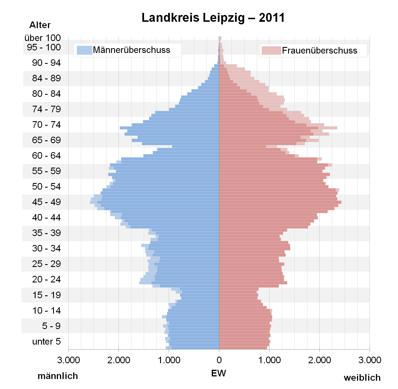 Bevölkerungspyramide des Landkreises Leipzig nach Zensus 2011.